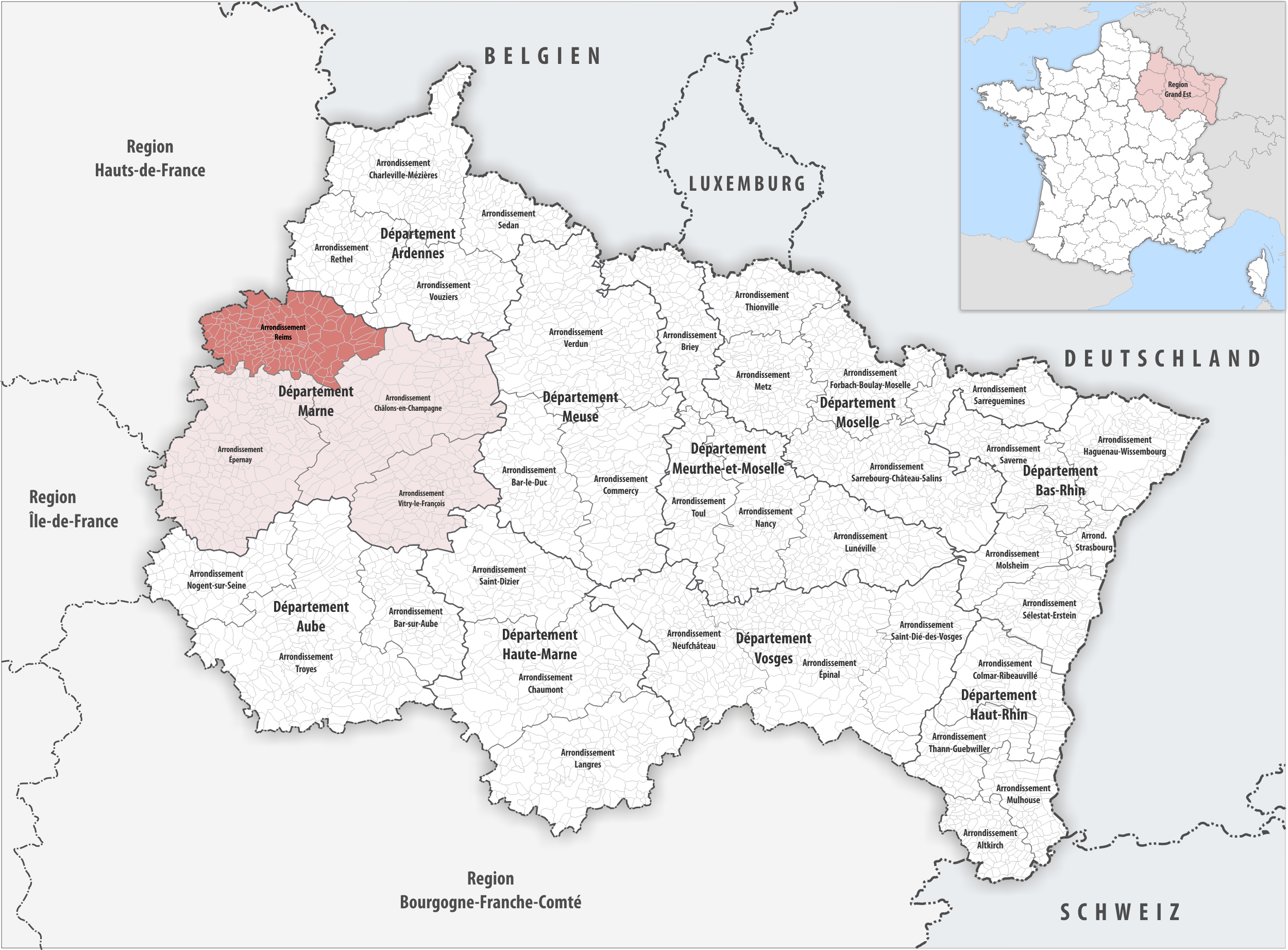 Lage des Arrondissements Reims